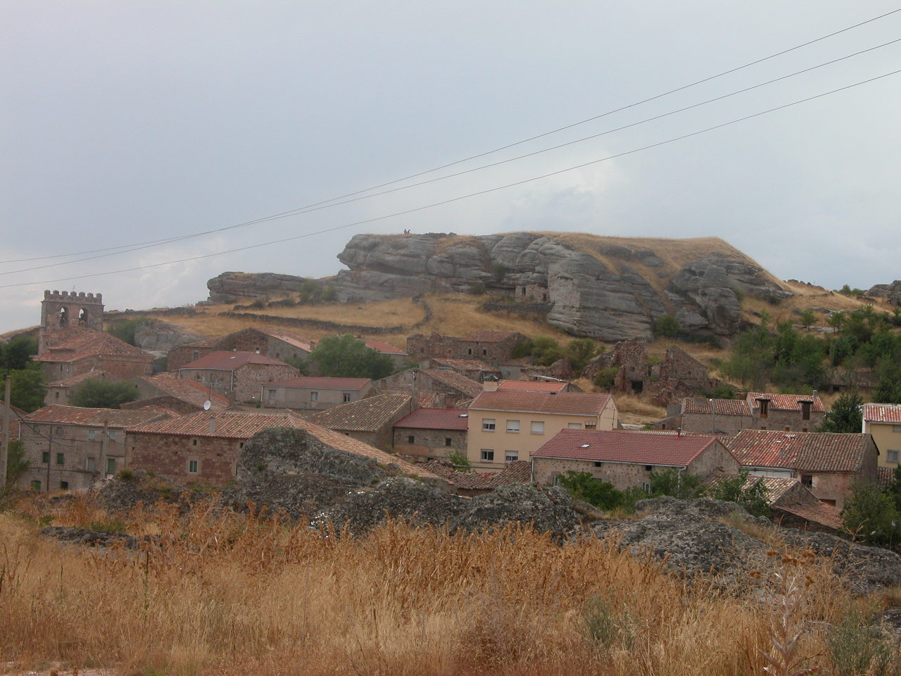 Miño de Medinaceli, Soria, España